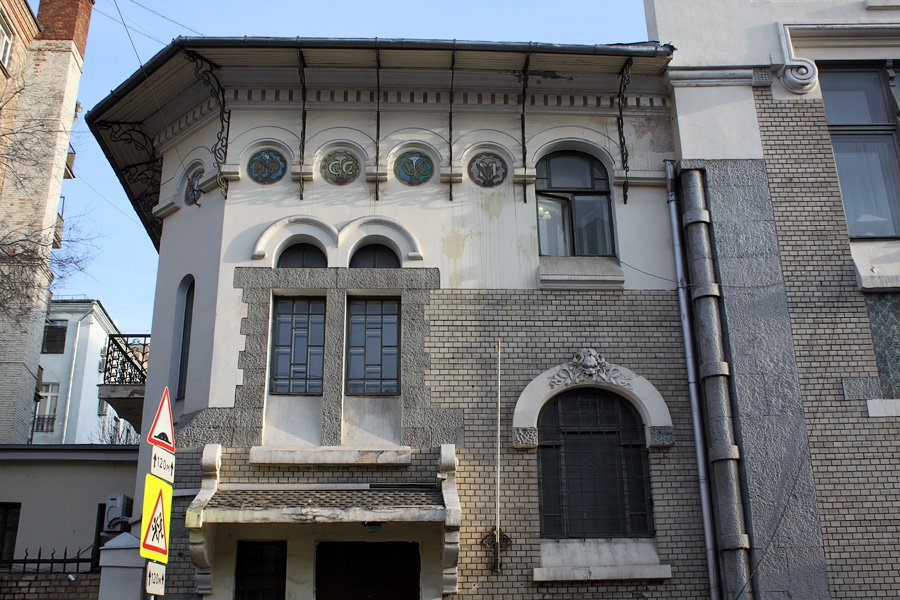 Оформление фасада собственного дома архитектора С. У. Соловьёва в Москве по адресу Малый Ржевский переулок, 6/Хлебный переулок, 18.